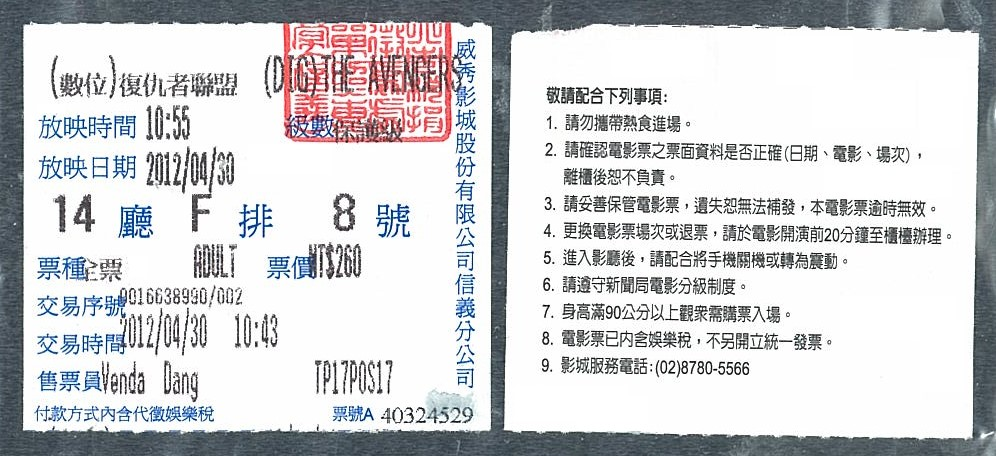 台北信義威秀影城（威秀影城股份有限公司信義分公司）開立的電影票正面（左）及背面（右）。